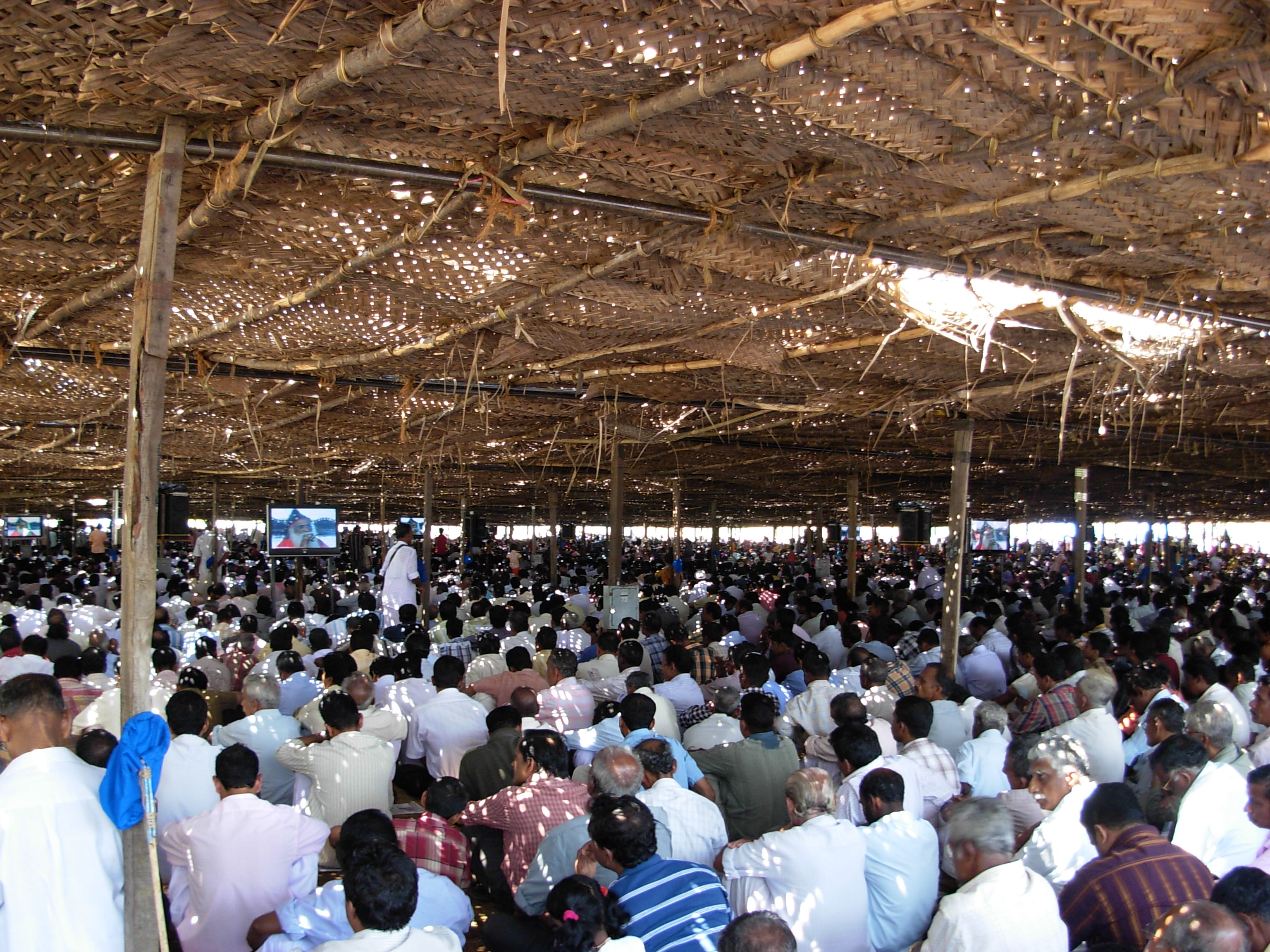 മാരാമണ്ണിൽ പ്രസംഗം ശ്രവിക്കുന്നവർ